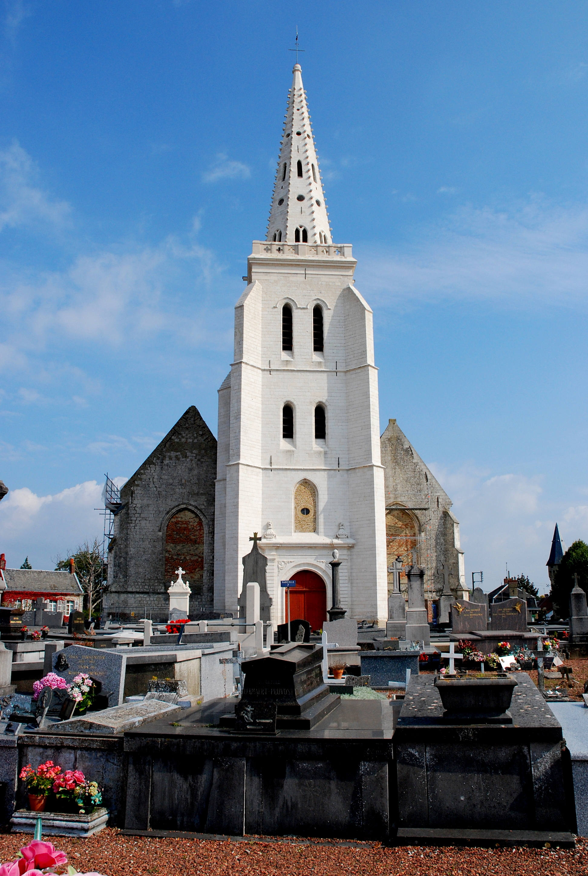 de kerk van Arques (Arke) in Pas-de-Calais, Frankrijk